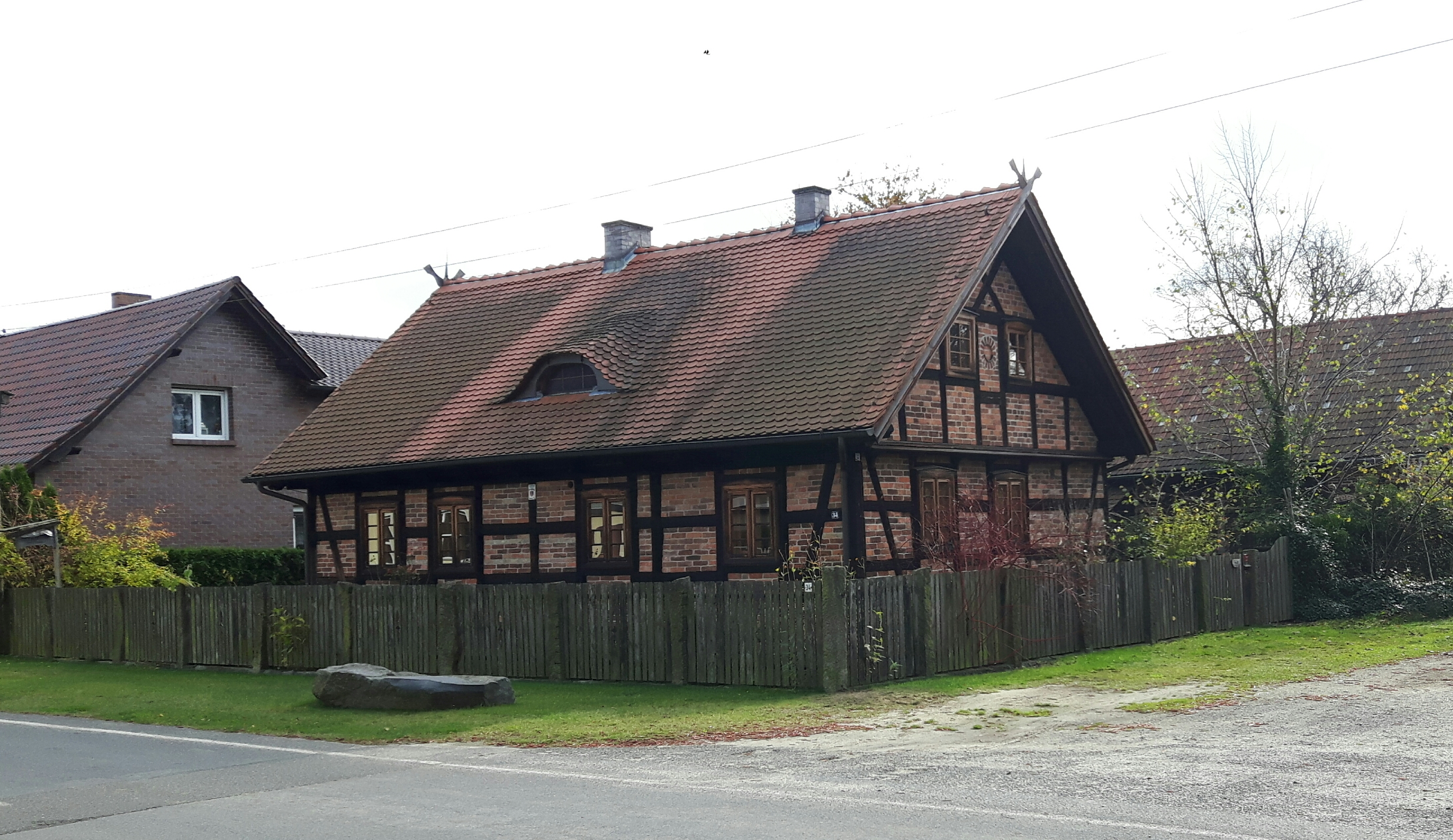 Der unter Denkmalschutz stehende Fachwerkhof Wußwerk in Brandenburg. Das Gebäude wurde um das Jahr 1860 herum errichtet.